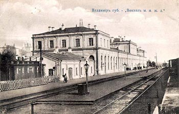 Вокзал станции Владимир Московско-Нижегородской ж. д. Дореволюционная открытка